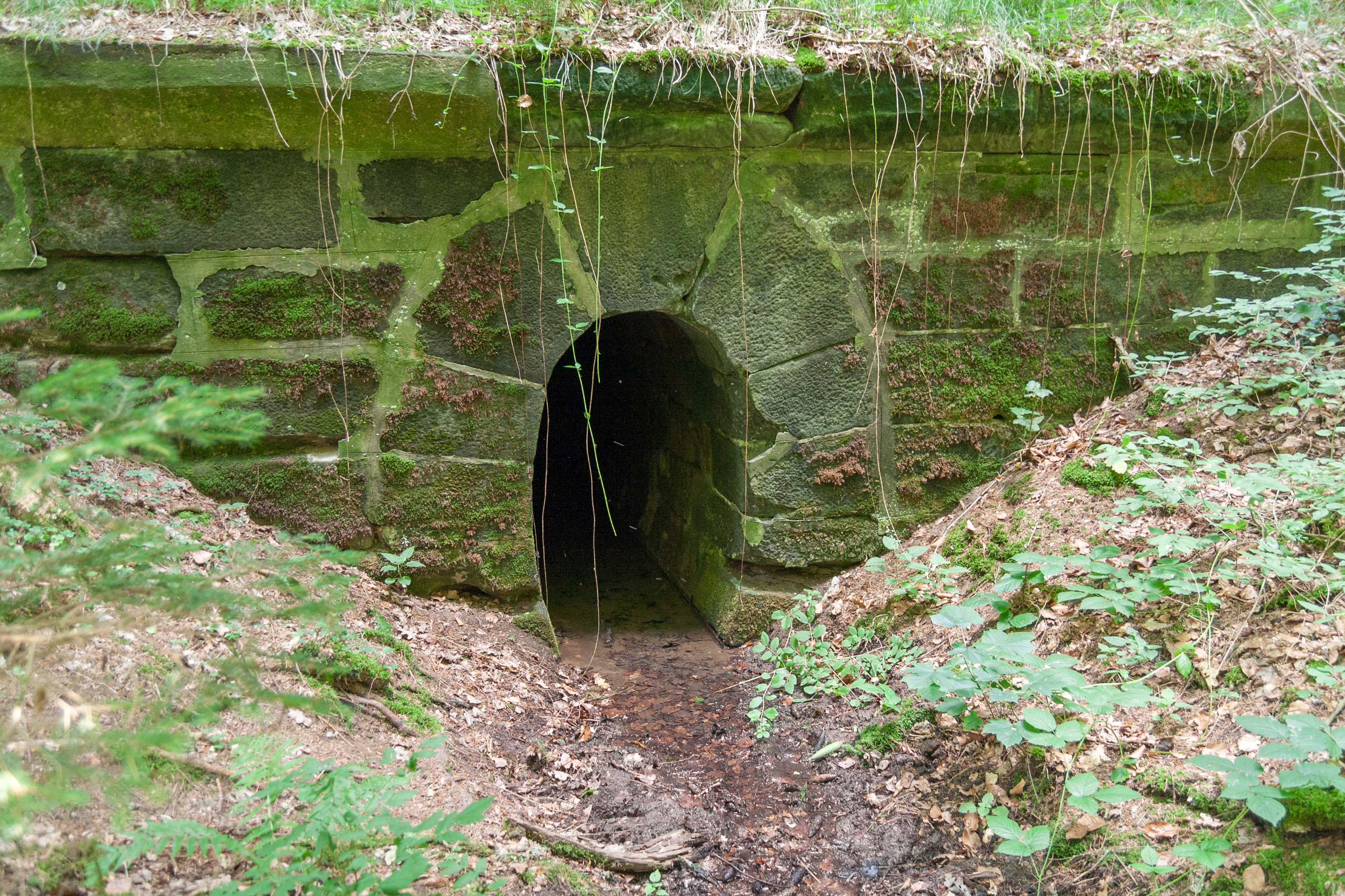 Ludwig-Donau-Main-Kanal, Distellochdamm, Westlicher Blindstollen, Auslass